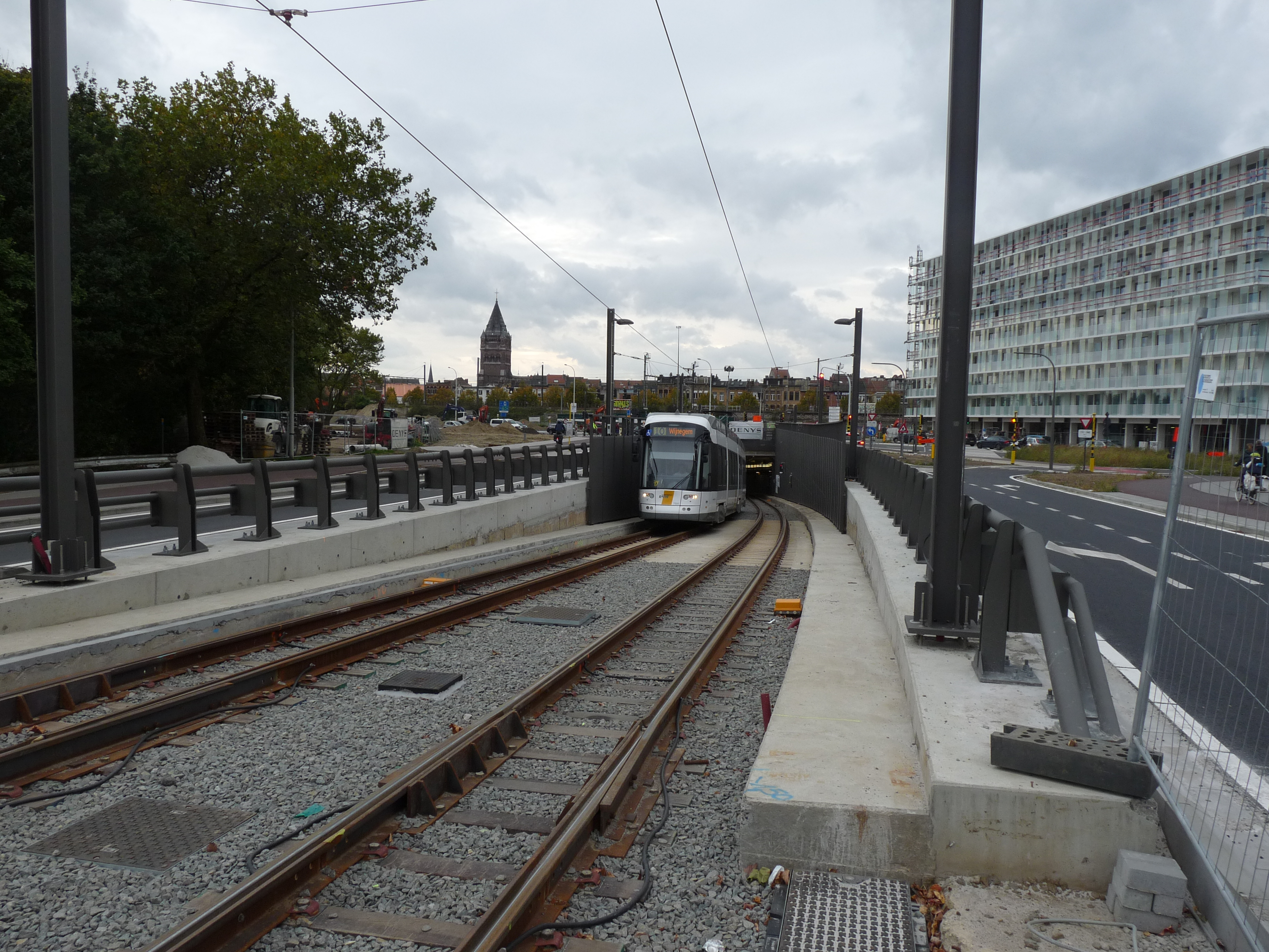 De nieuwe toegang tot het ondergronds tramtunnel netwerk voor tramlijn 10